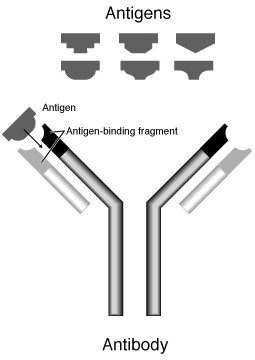 Antibody